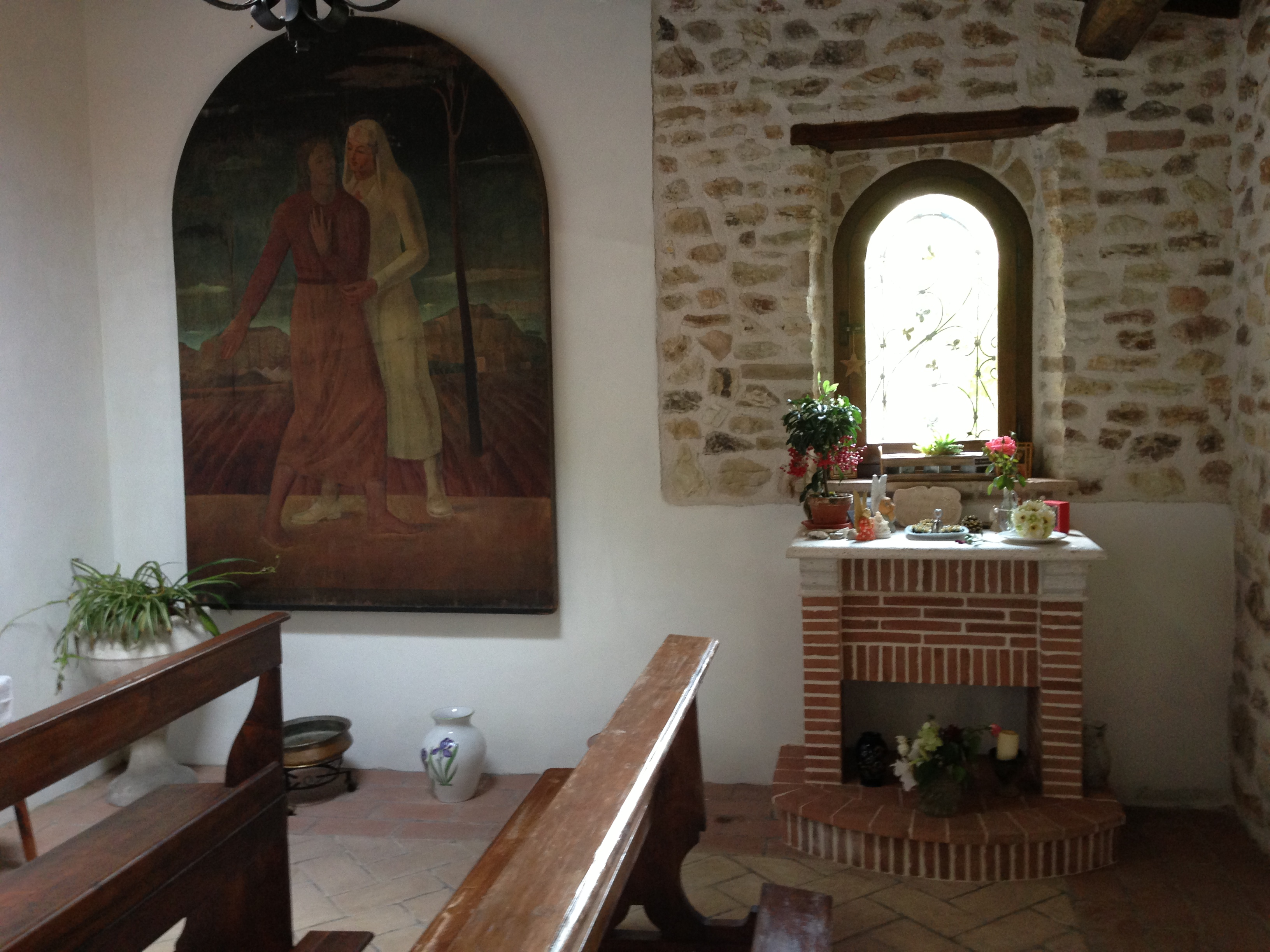 La MaMa Umbria - Santa Maria Reggiana, Spoleto - Cappella, altarino che custodisce le ceneri di Ellen Stewart